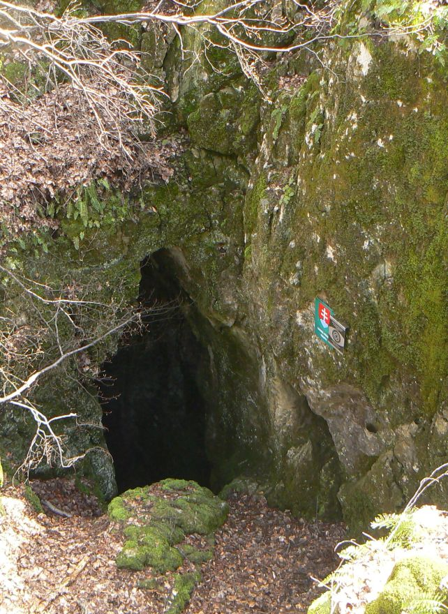 Vstupný relikt niekdajšej šachty s ústím hlavnej šachty (-63 m) v boku steny. Priepasť (-100 m) predkvartérneho veku (pravdepodobne pliocén) prekonala korózno-rútivý vývoj v masíve krasového vrchu na plošine planiny Dolný vrch. Národná prírodná pamiatka.